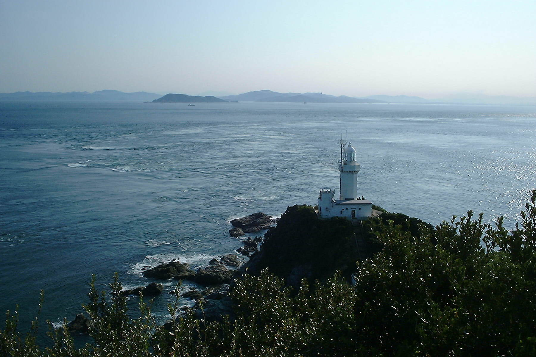 佐田岬の海峡